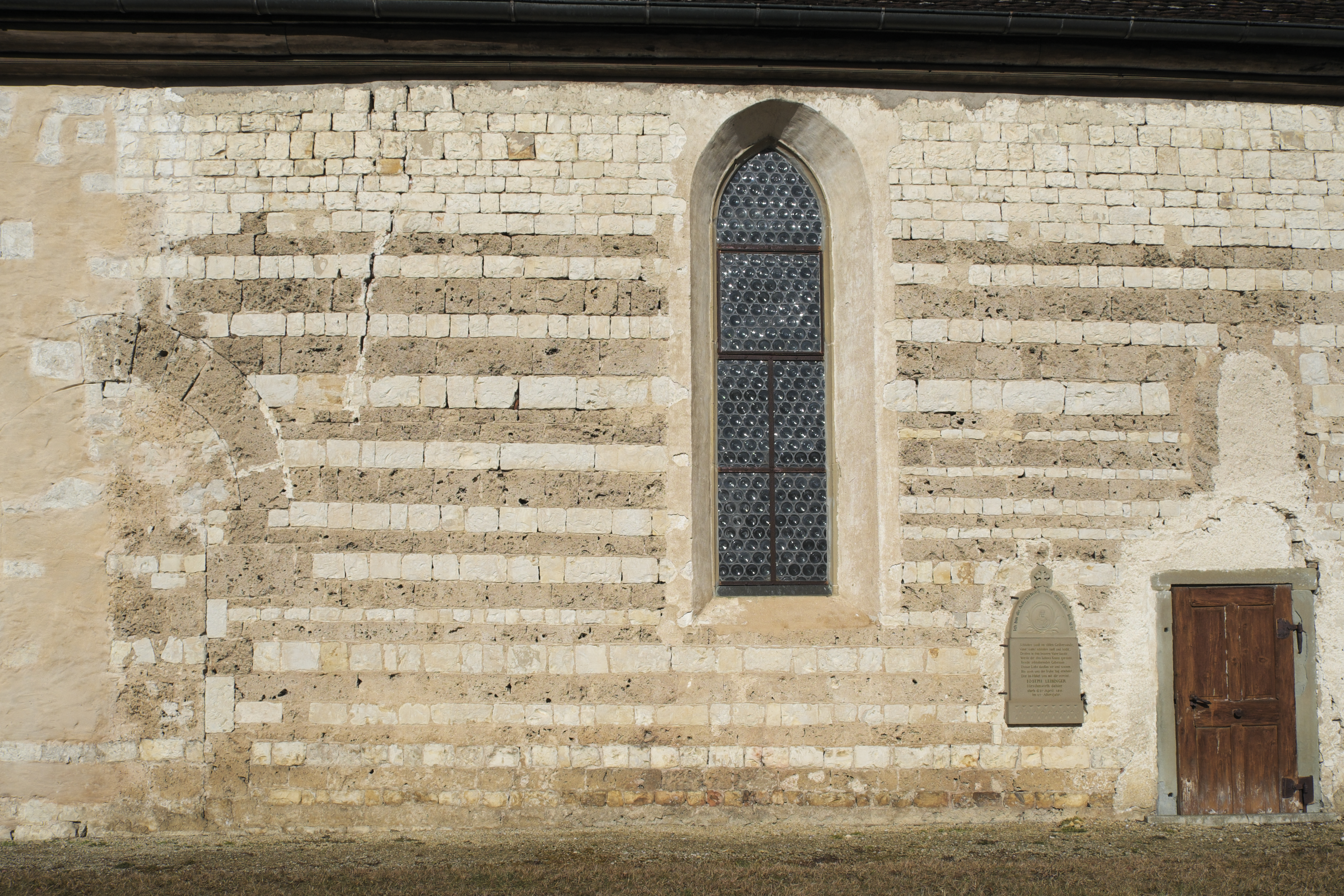 Friedhofskirche, ehemalige Pfarrkirche, St. Gallus in Mühlheim an der Donau im Landkreis Tuttlingen (Baden-Württemberg/Deutschland), Südseite